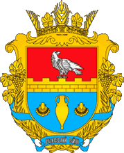 Герб Очаківського району